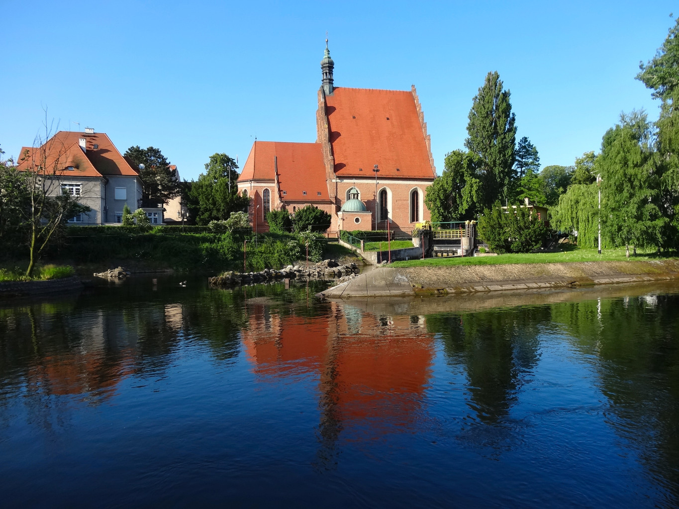 Katedra p.w. św. Marcina i Mikołaja w Bydgoszczy (XIV-XV wiek) nad Brdą